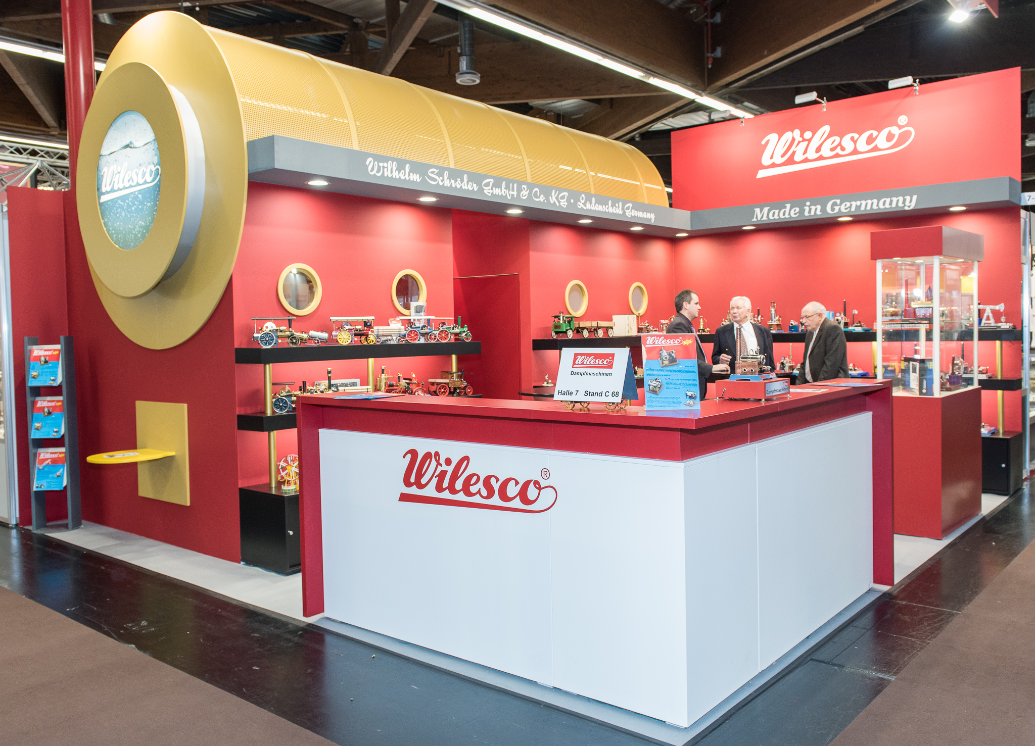 International Toy Fair Nürnberg,Messestand,Modelldampfmaschine,Spielwarenmesse,Wilesco,Wilhelm Schröder GmbH & Co. KG Metallwarenfabrik